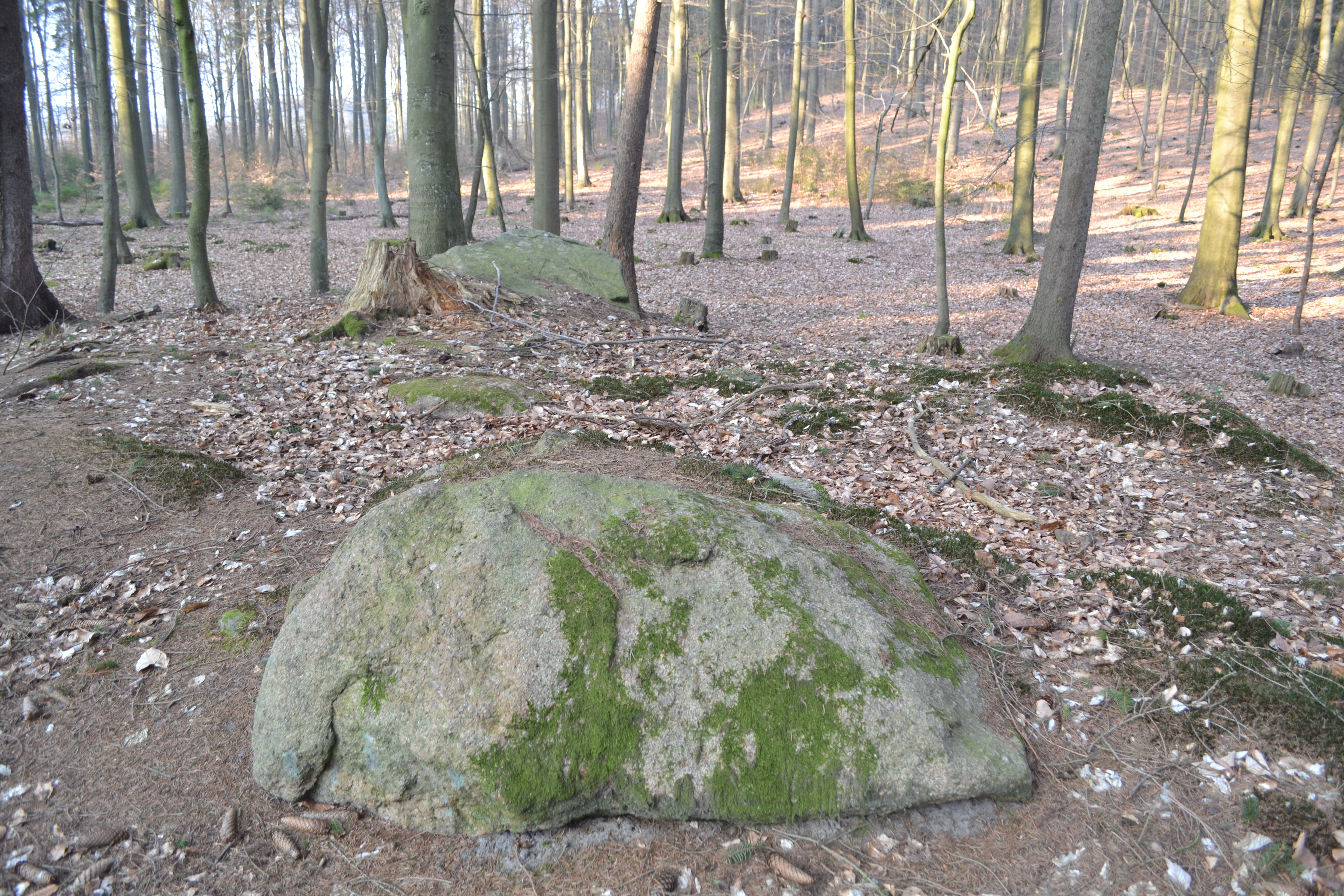 Großsteingrab Lübberstedt 3 (ohne Sprockhoff-Nummer)